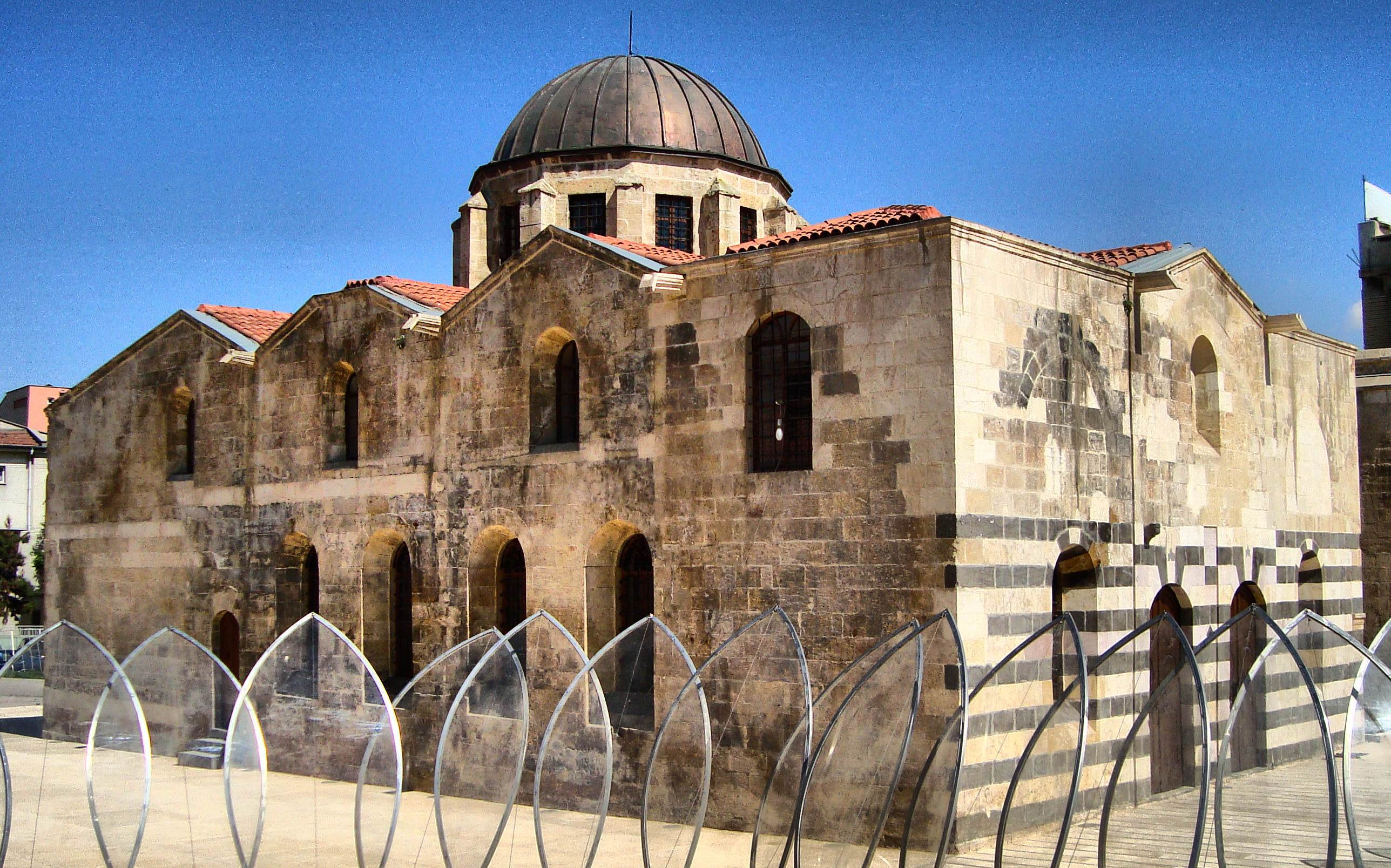 Aziz Bedros Ermeni kilisesi-Gaziantep